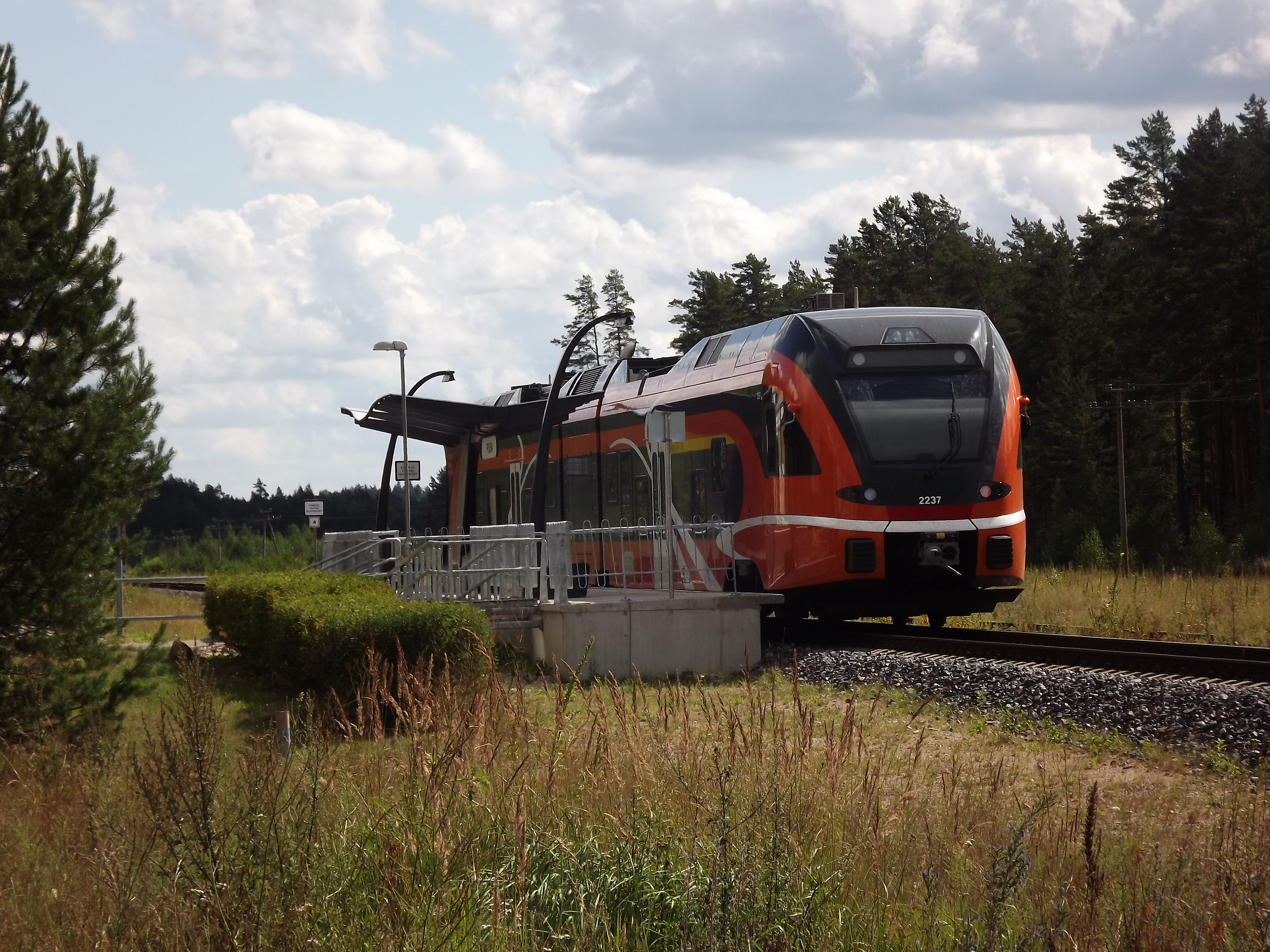 Reisirong Stadler FLIRT DMU 2237 "Linda" Piusa jaamas.